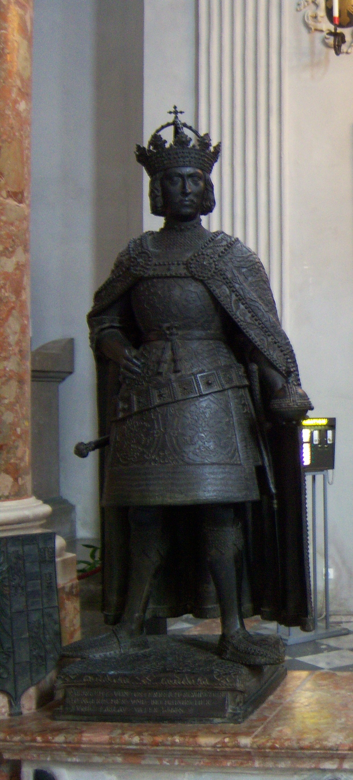 Statue von Albrecht II in der Innsbrucker Hofkirche